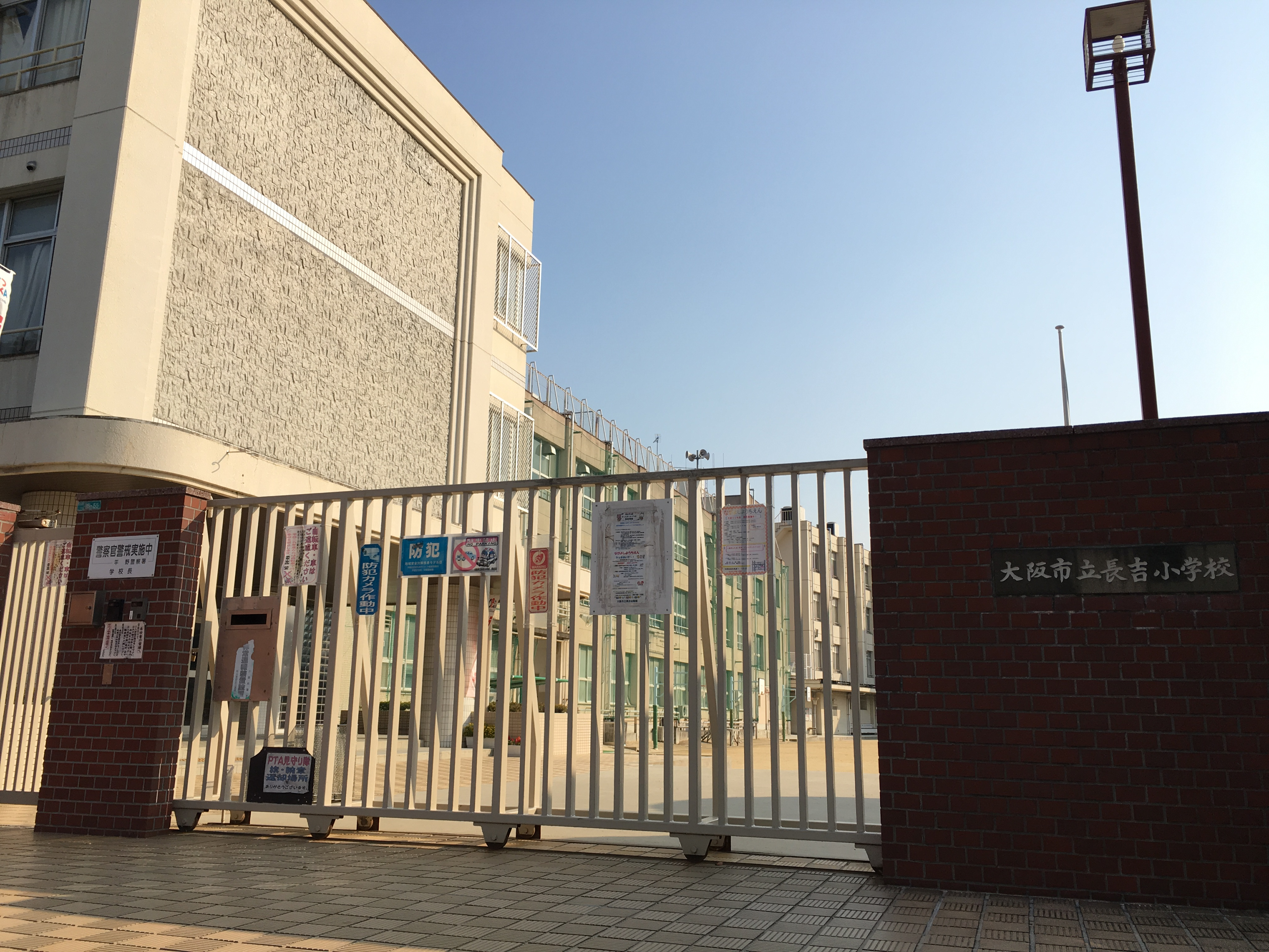 長吉小学校